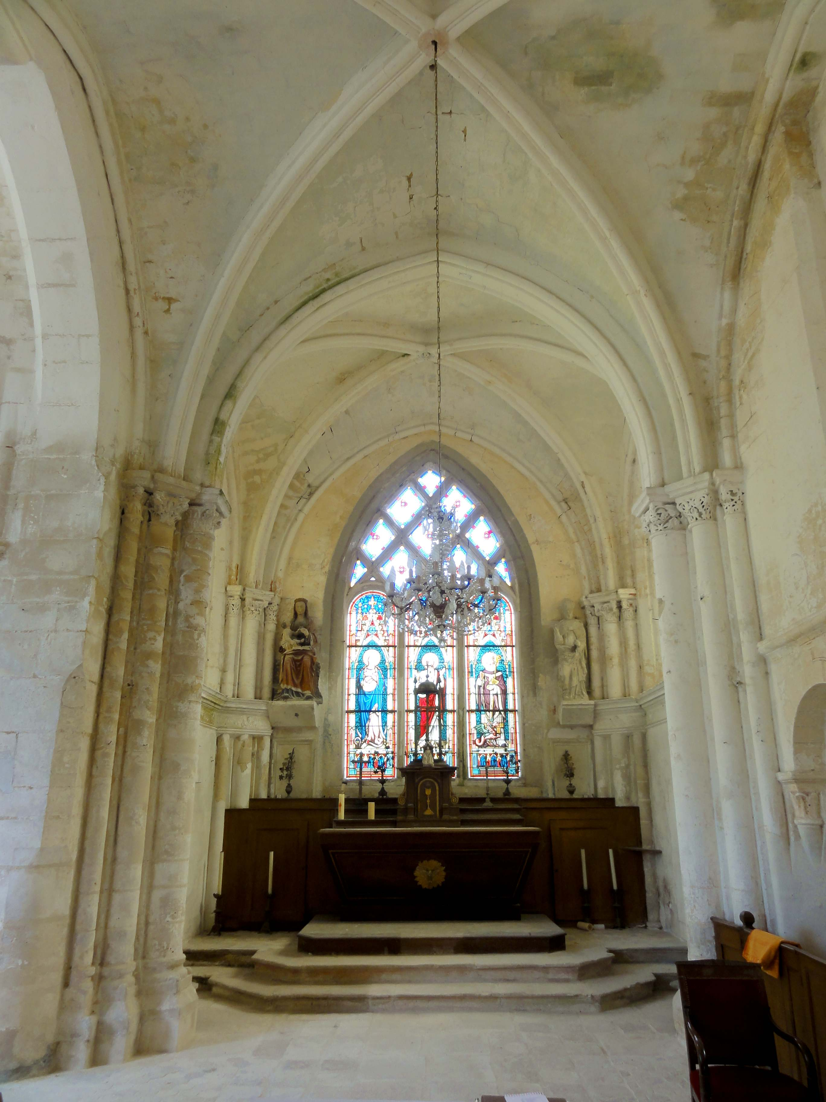 Intérieur de l'église (voir titre).